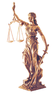 Imagen de metal de una mujer que está vendada por los ojos y que sostiene en una de sus manos una balalanza y en la otra una daga en señal de justicia